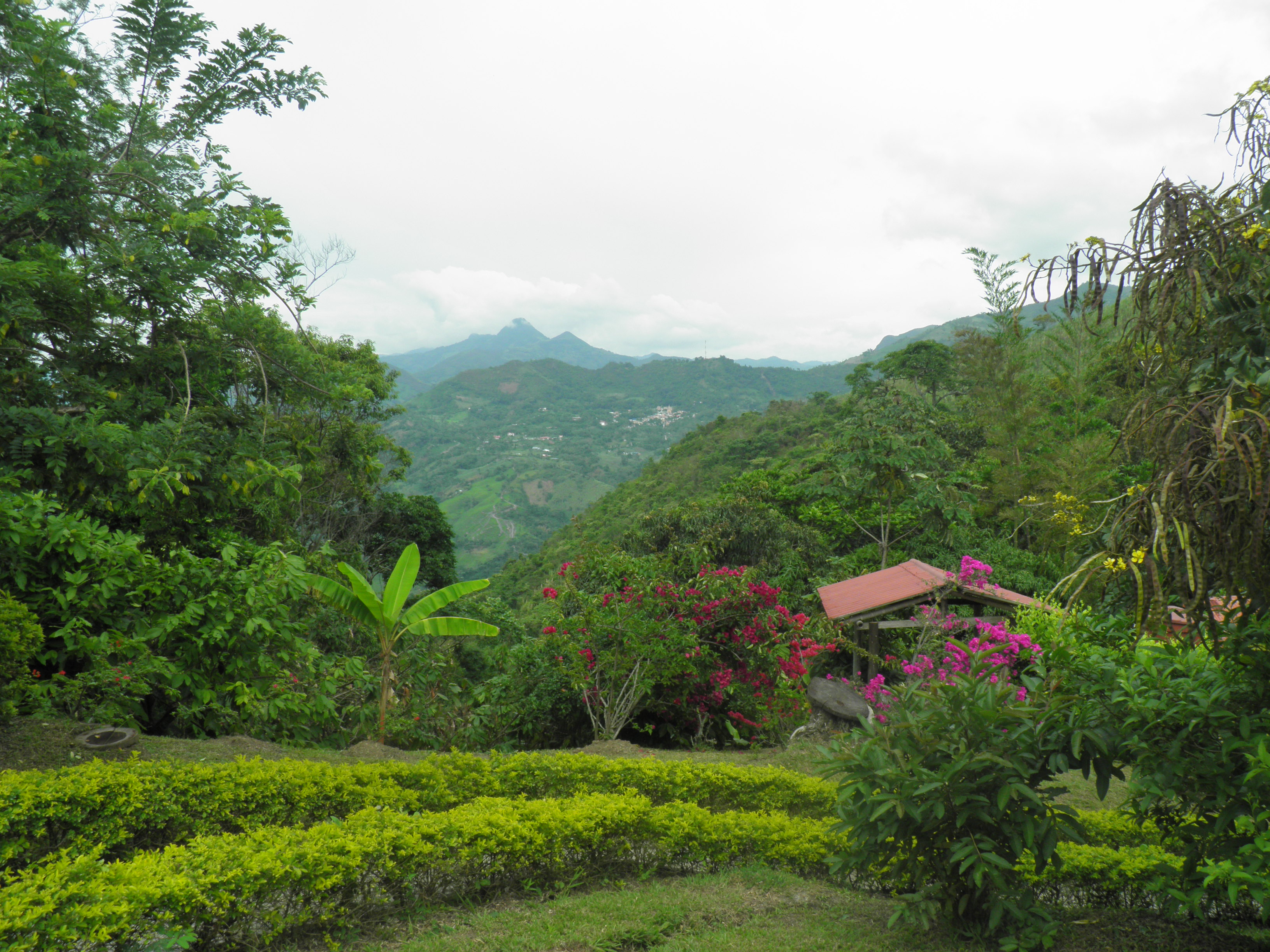 Andy v provincii Cundinamarca, obec Nocaima